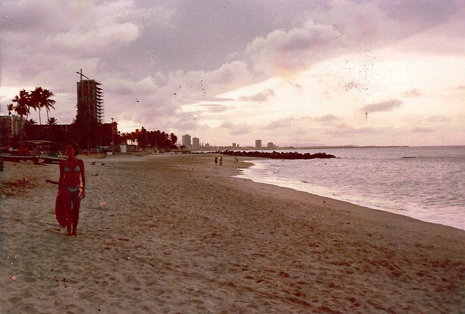 Imagem da orla de Fortaleza na década de 1980 a partir da praia do Mucuripe